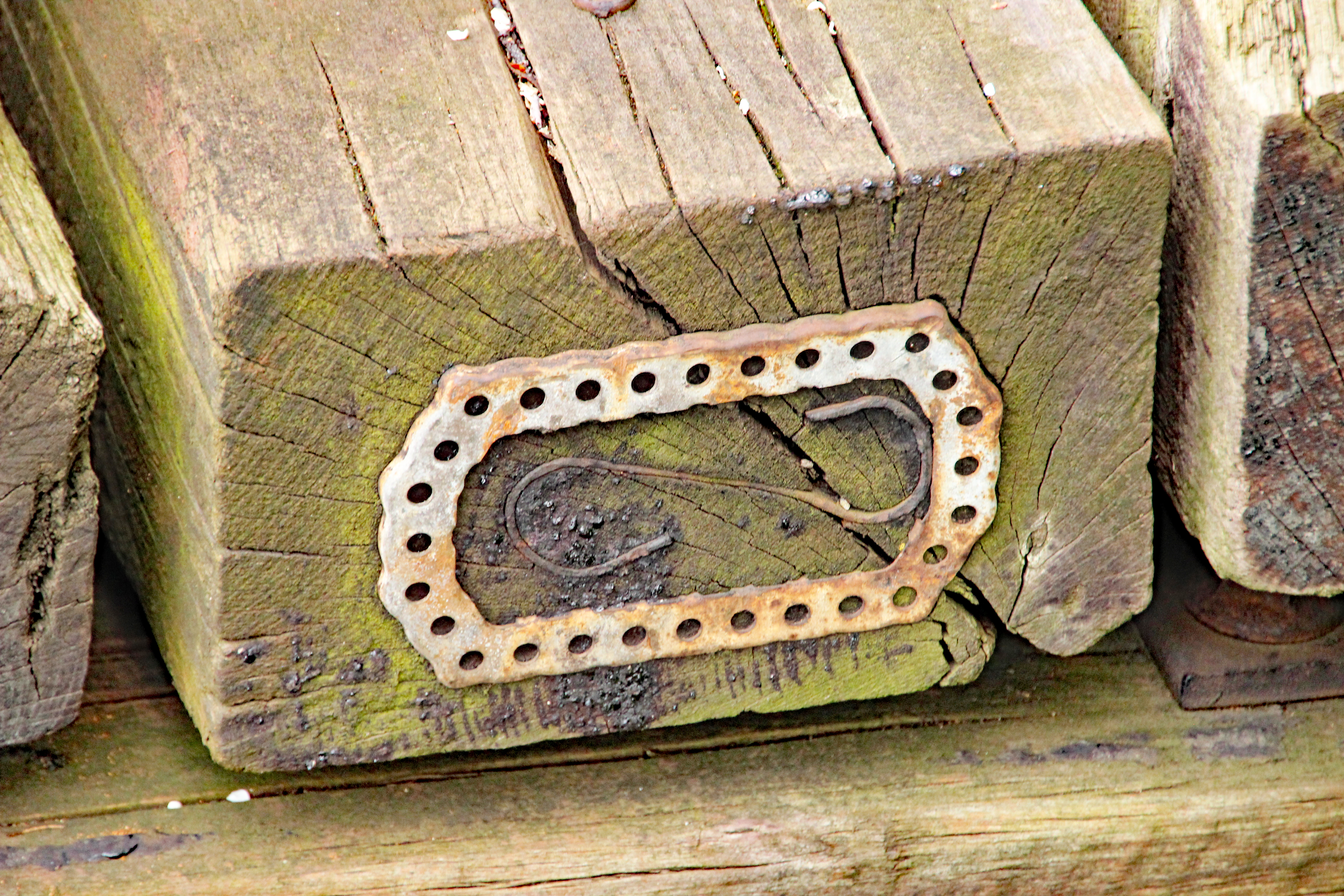 Bildinhalt: Hölzerne Bahnschwelle mit Kronenblech im Hirnholz im Außenbereich des Deutschen Technikmuseums Berlin Aufnahmeort: Berlin, Deutschland